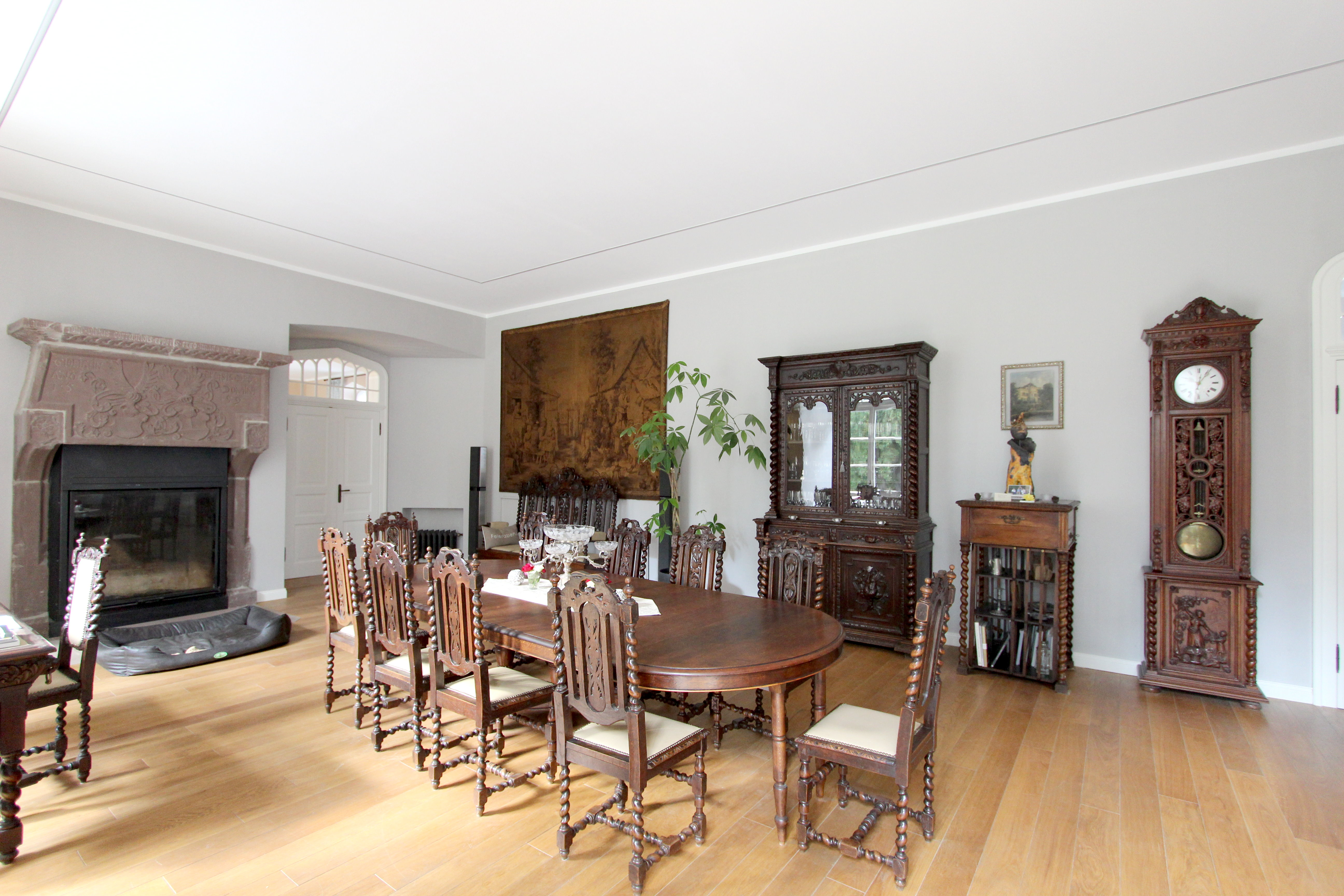 54675 Körperich, Schloss Kewenig 1. Schloss Kewenig zählt zu den ältesten Gutshäusem im Landkreis Bitburg-Prüm. Das Schloss wurde 793 durch Gerswindis dem Kloster Lorsch geschenkt und 1231 urkundlich als Villa de Cheweningen erwähnt. Einst Sitz der Herrn von Stein. Der Kern ist eine Wasserburg von quadratischem Grundriss mit Ecktürmen und Rundbogenfries des 16. Jahrhunderts (war 1816 verfallen und 1890-91 erweitert worden. Instandsetzung 1970-71). Innenaufnahme des Kaminzimmers von 2018.